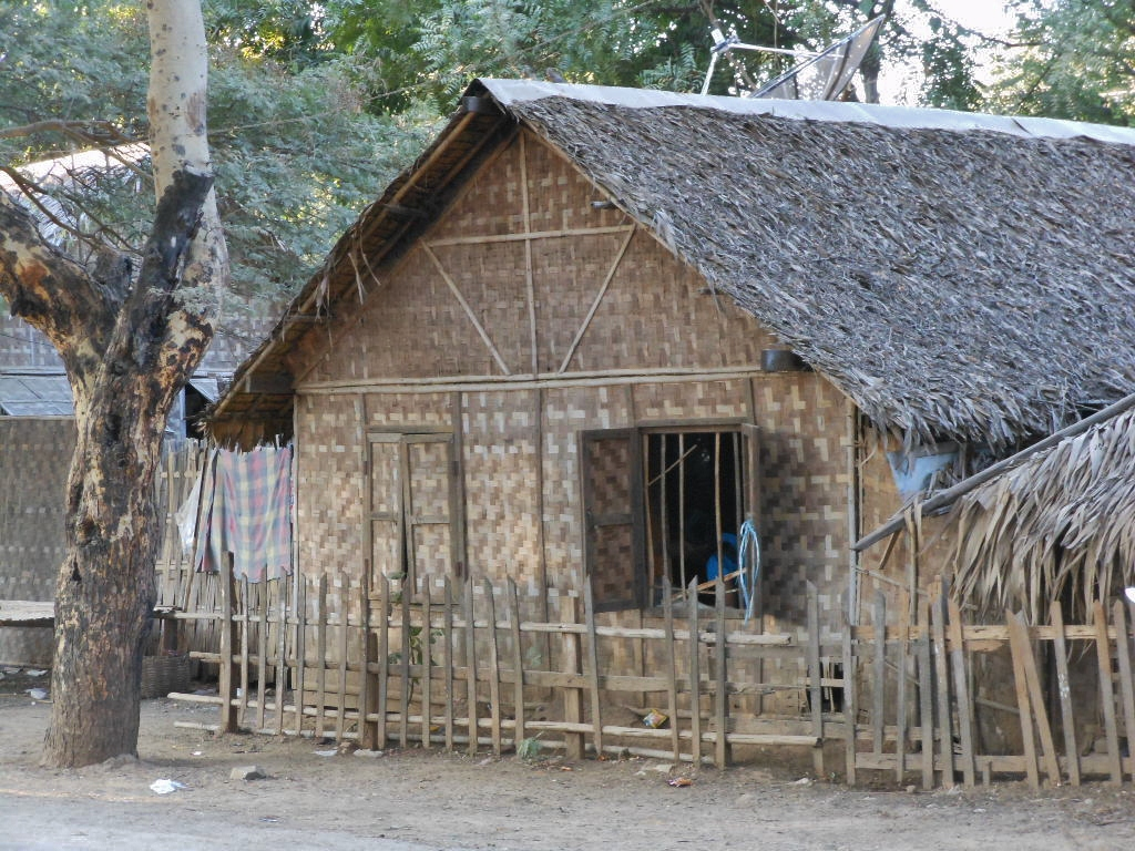 Cadjan House